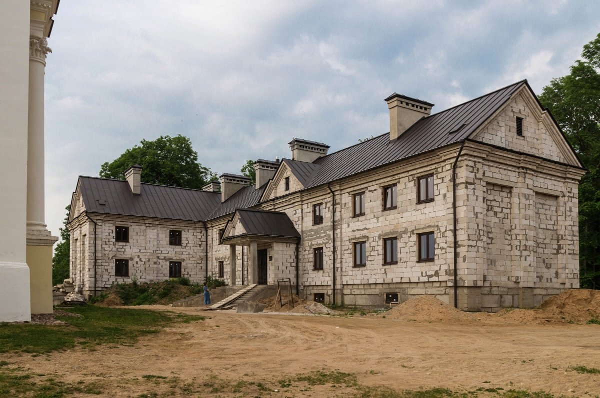 Мядзел. Будоўля новага кляштара